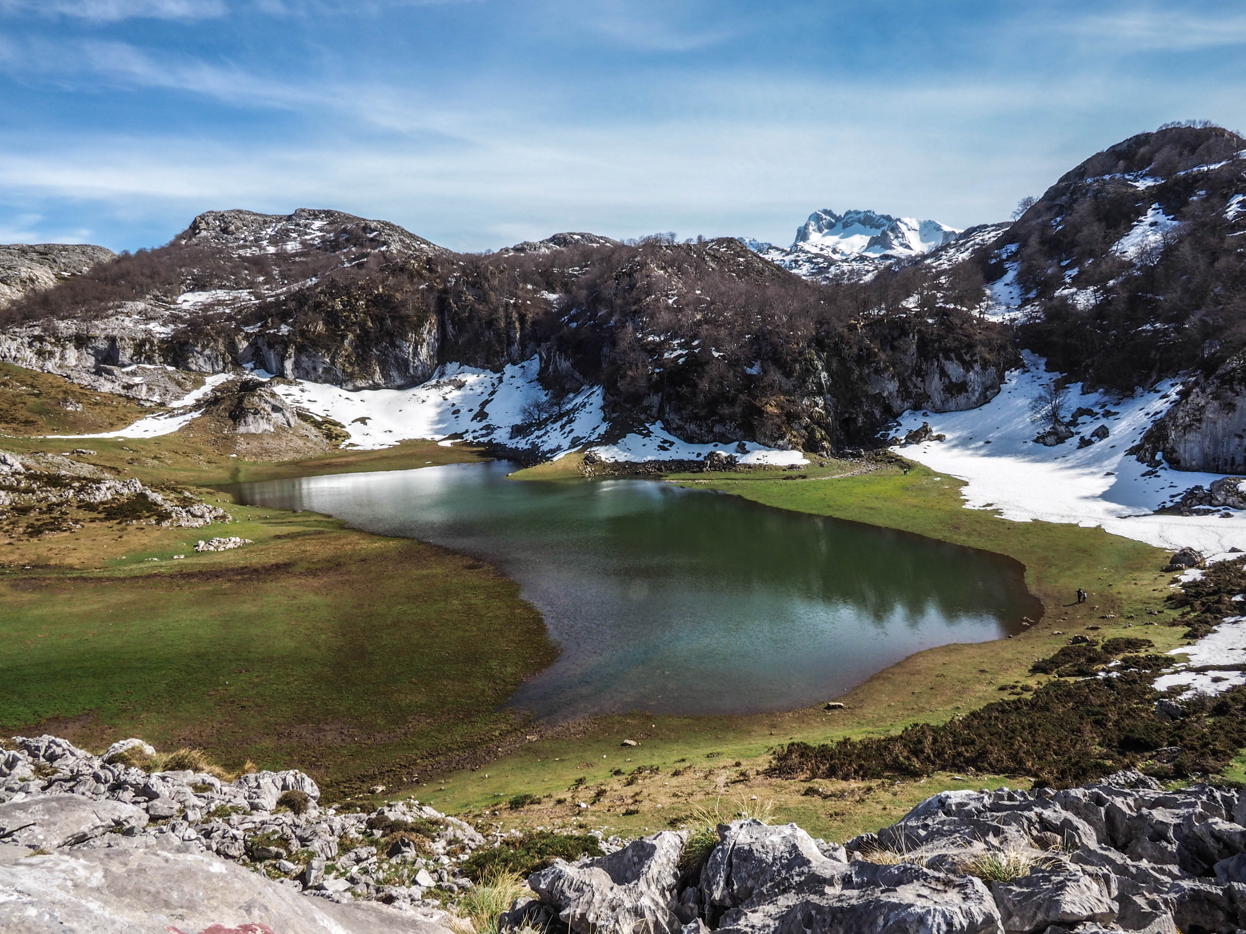 El suelo de roca caliza de los Picos de Europa hace que el agua se filtre hacia el subsuelo y hace de este lago un paisaje evanescente coincidiendo con la época del deshielo. This is a photography of a Site of Community Importance in Spain with the ID: ES1200001. Natura2000 entry, EEA entry